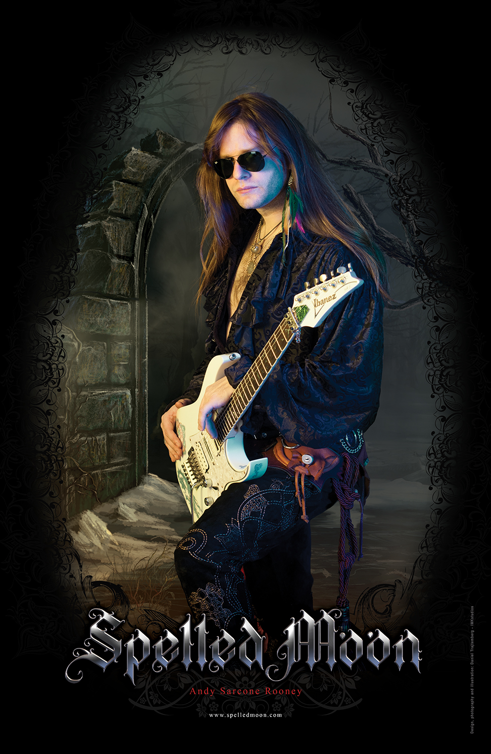 Andy Sarcone Rooney, cantante y guitarrista de Spelled Moon, grupo estadounidense de heavy metal tradicional y power metal épico, originario de Los Ángeles (California), (Estados Unidos).